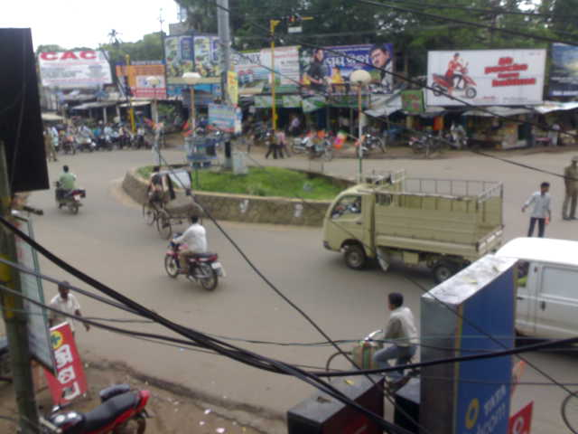 Balasore